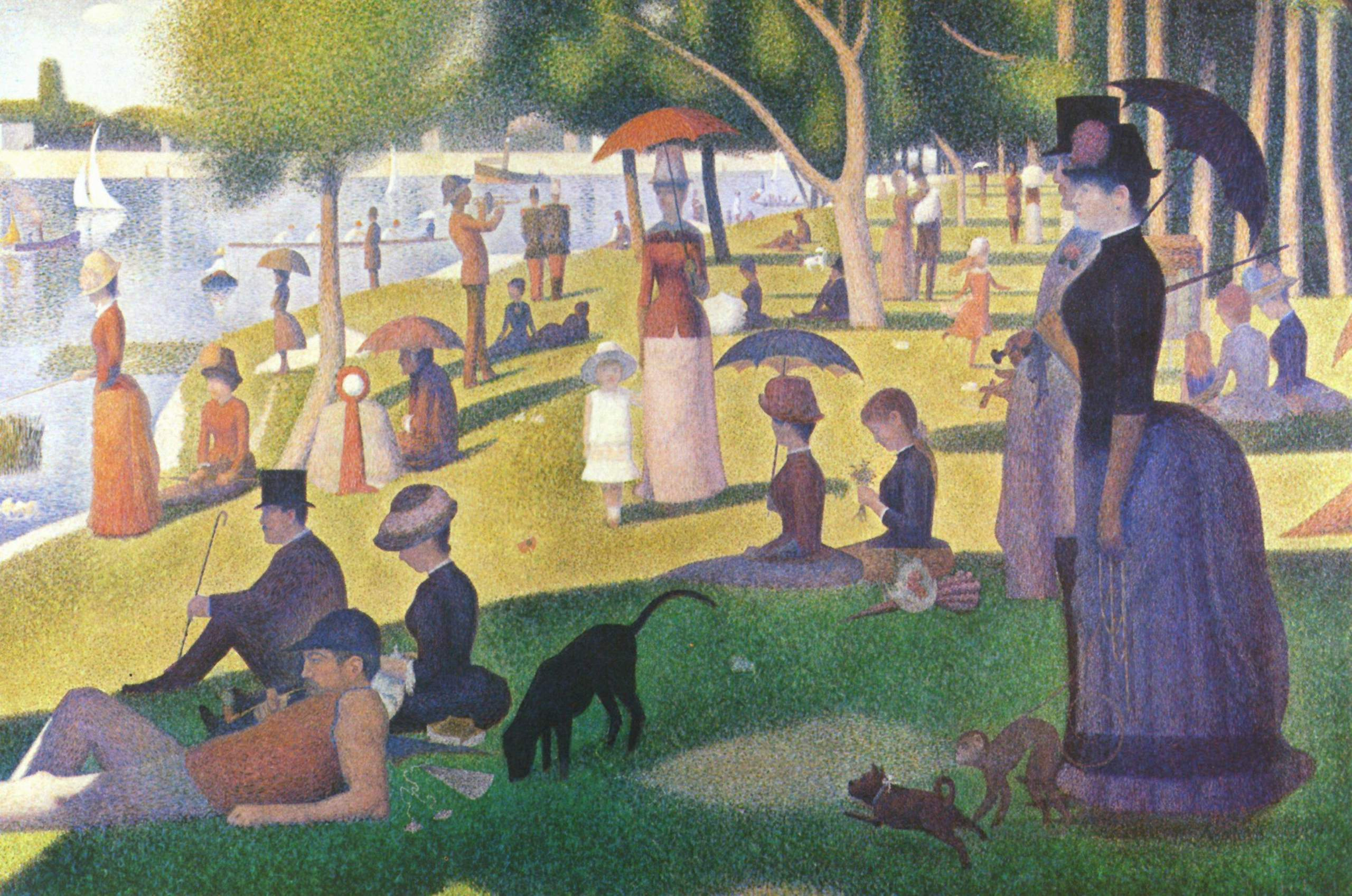 Bassin de Courbevoie-Asnières, Seine, Hauts-de-Seine, France.